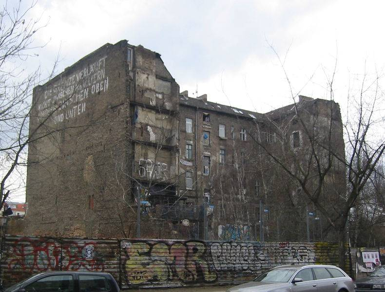 Squat Köpi in Berlin.